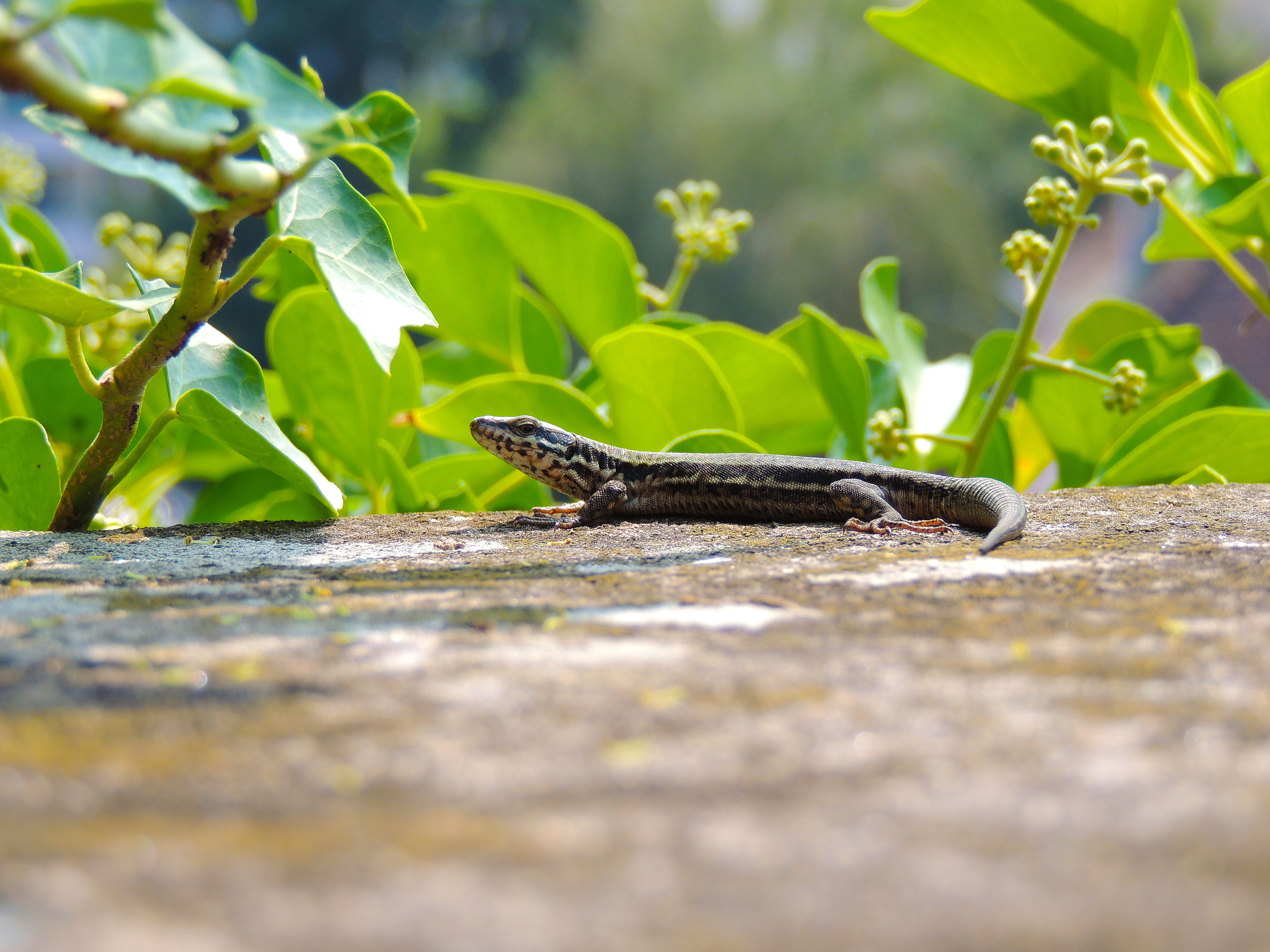 Lézard des murailles (Podarcis muralis) se chauffant au soleil.